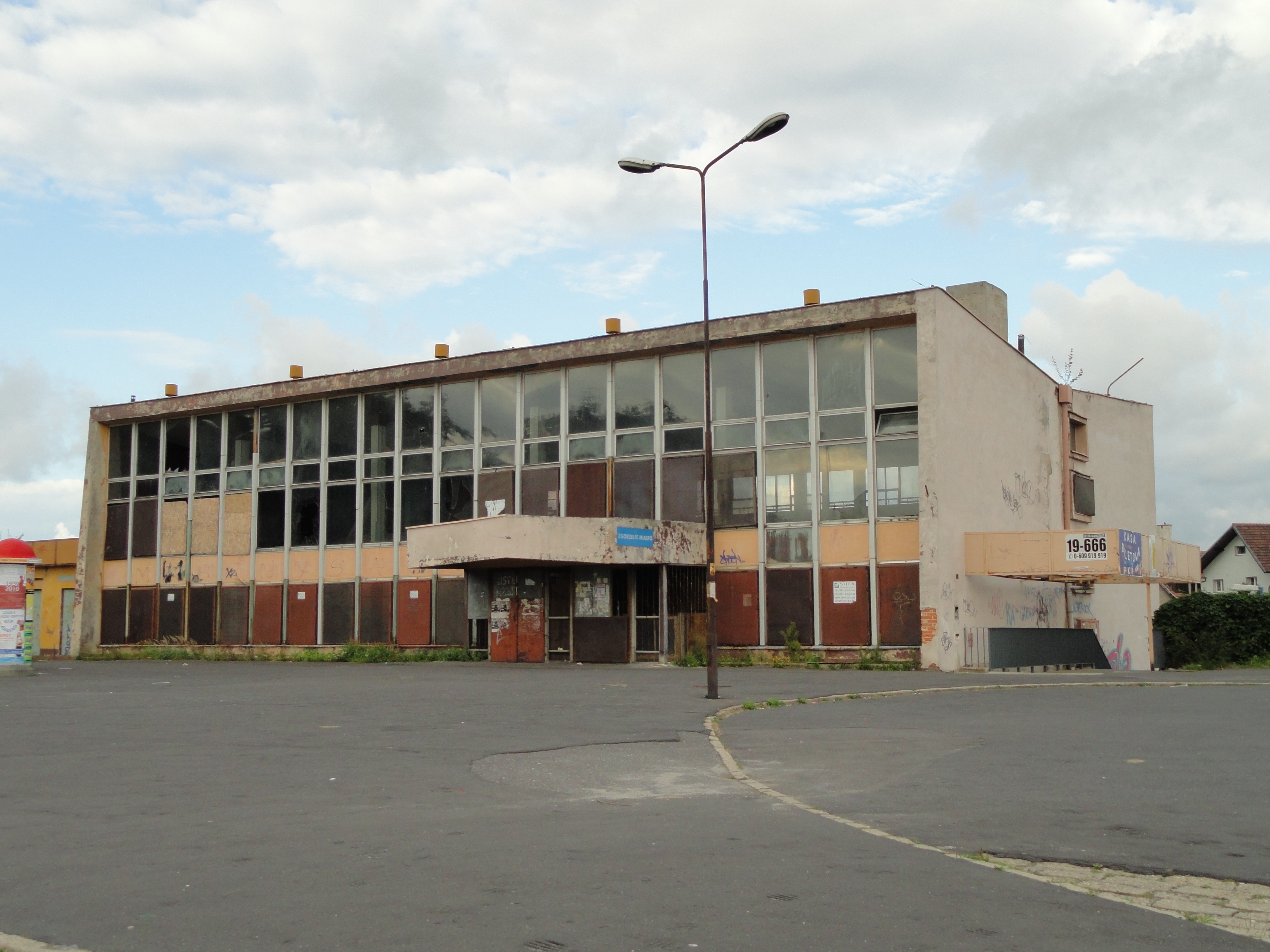 verfallenes Gebäude des Haltepunktes Zgorzelec Miasto